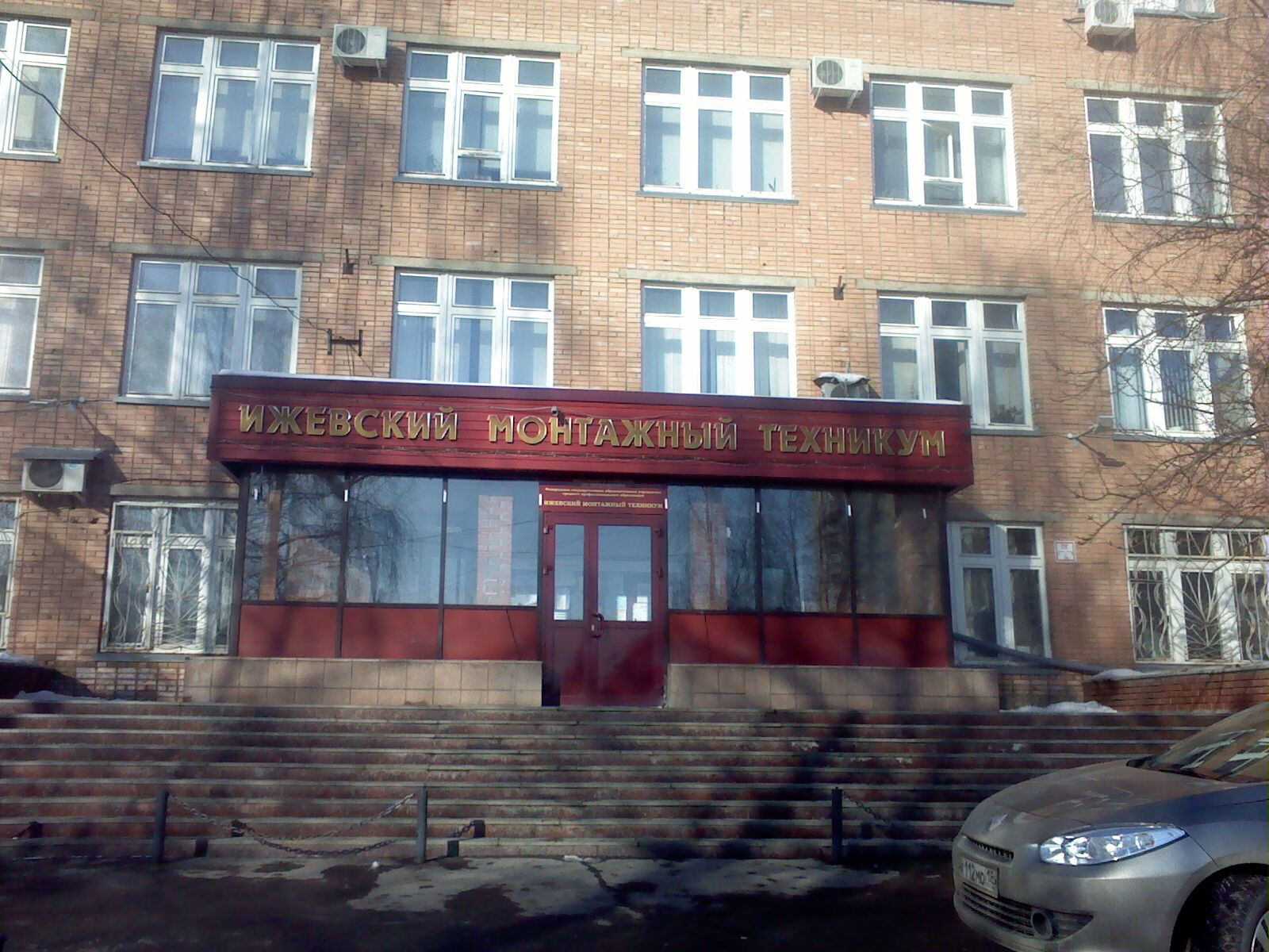 Монтажный техникум на улице Кирова в городе Ижевск